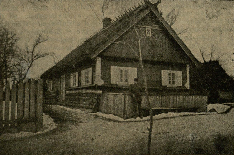 Беларуская (тарашкевіца): Астрамечава (Astramiečava). Народная бібліятэка